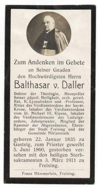 Balthasar von Daller, kath. Priester und bayerischer Landtagsabgeordneter (1835-1911), Ritter des Verdienstordens der Bayerischen Krone